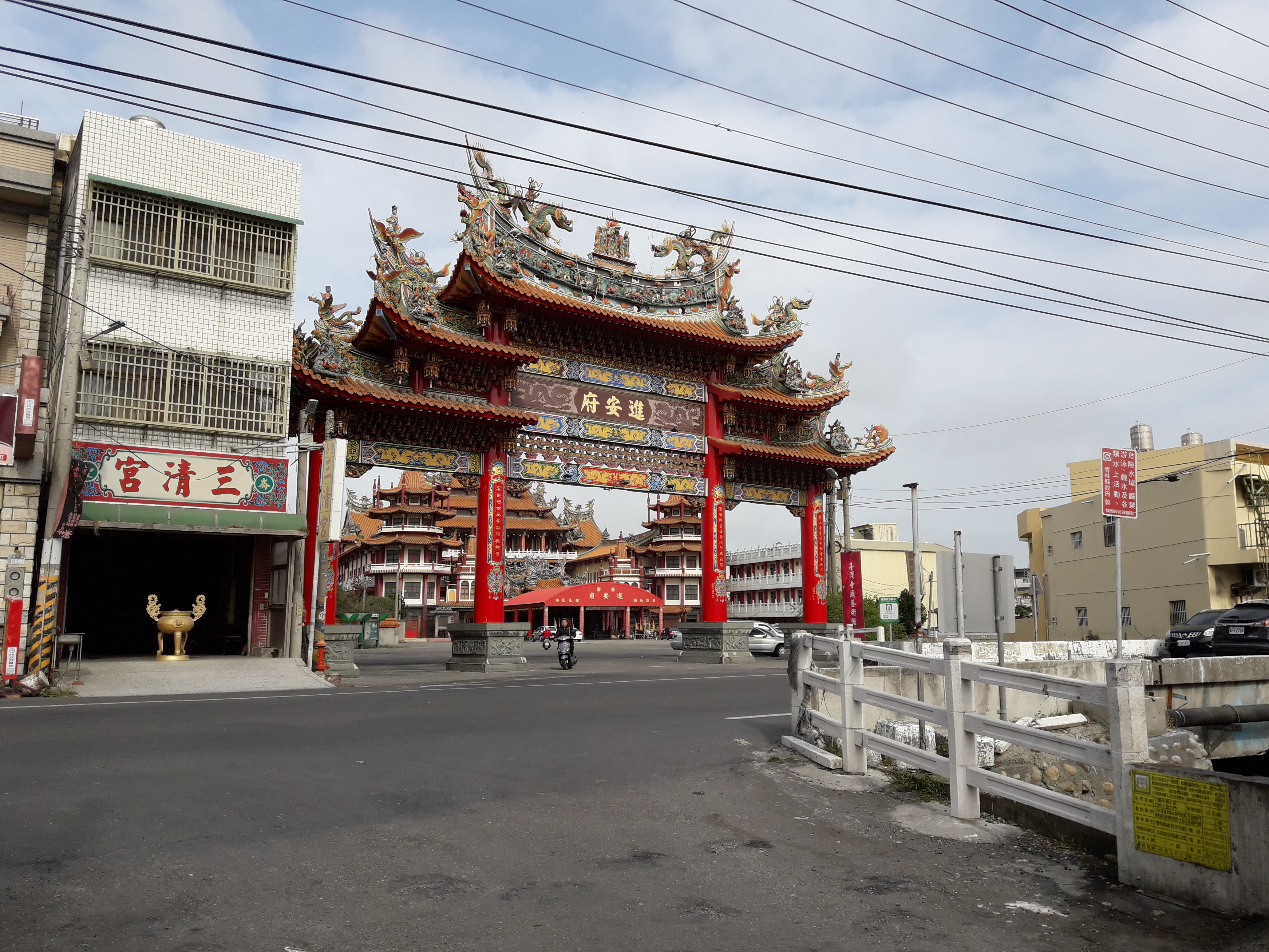 中華民國臺灣省雲林縣台西鄉崙豐進安府牌樓